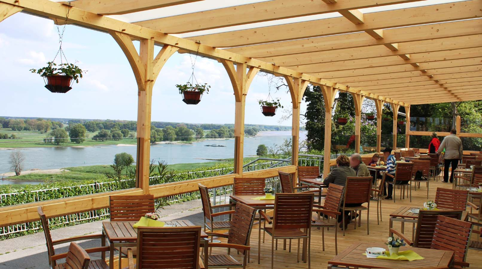 Die Elbe von der Burggaststätte Arneburg aus gesehen.